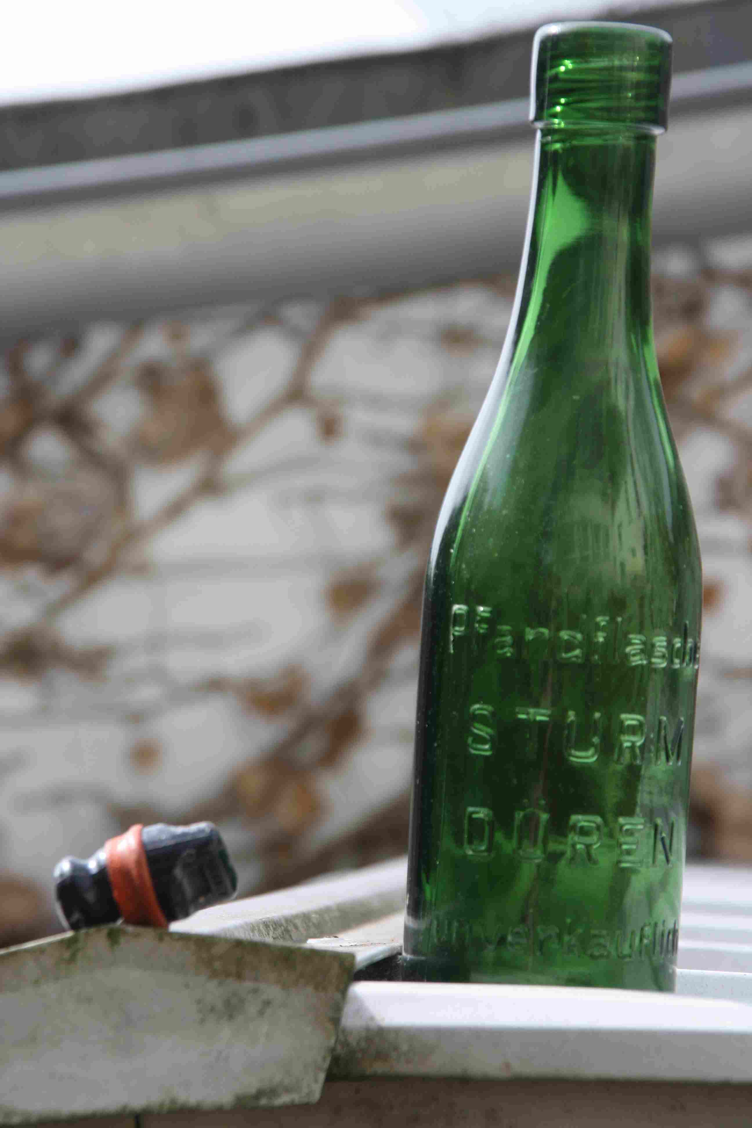 Proprietäre Reliefglas Bierflasche mit seltenem Drehverschluss der Sturmbrauerei Düren